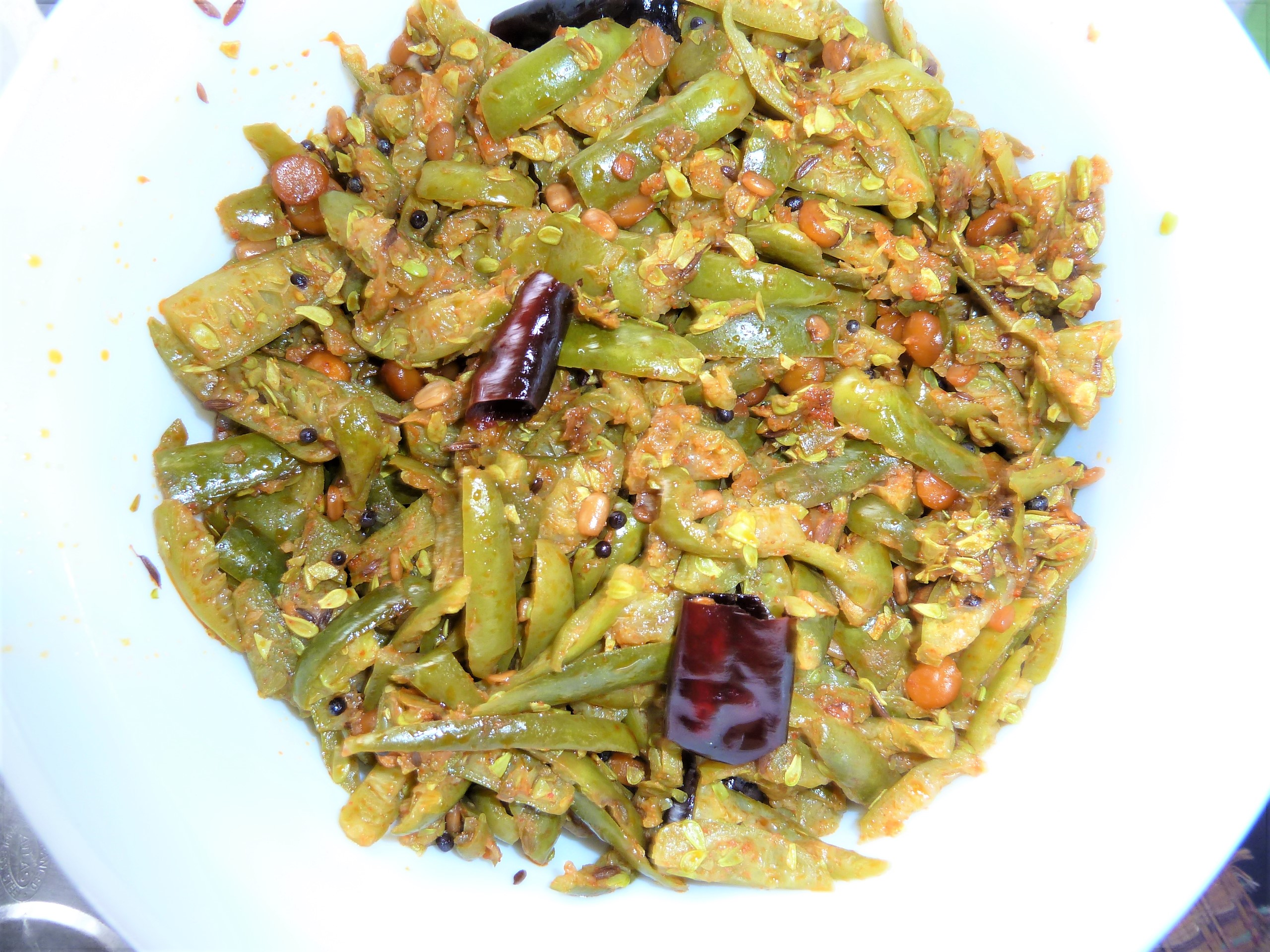 దొండకాయ పోపు కూర